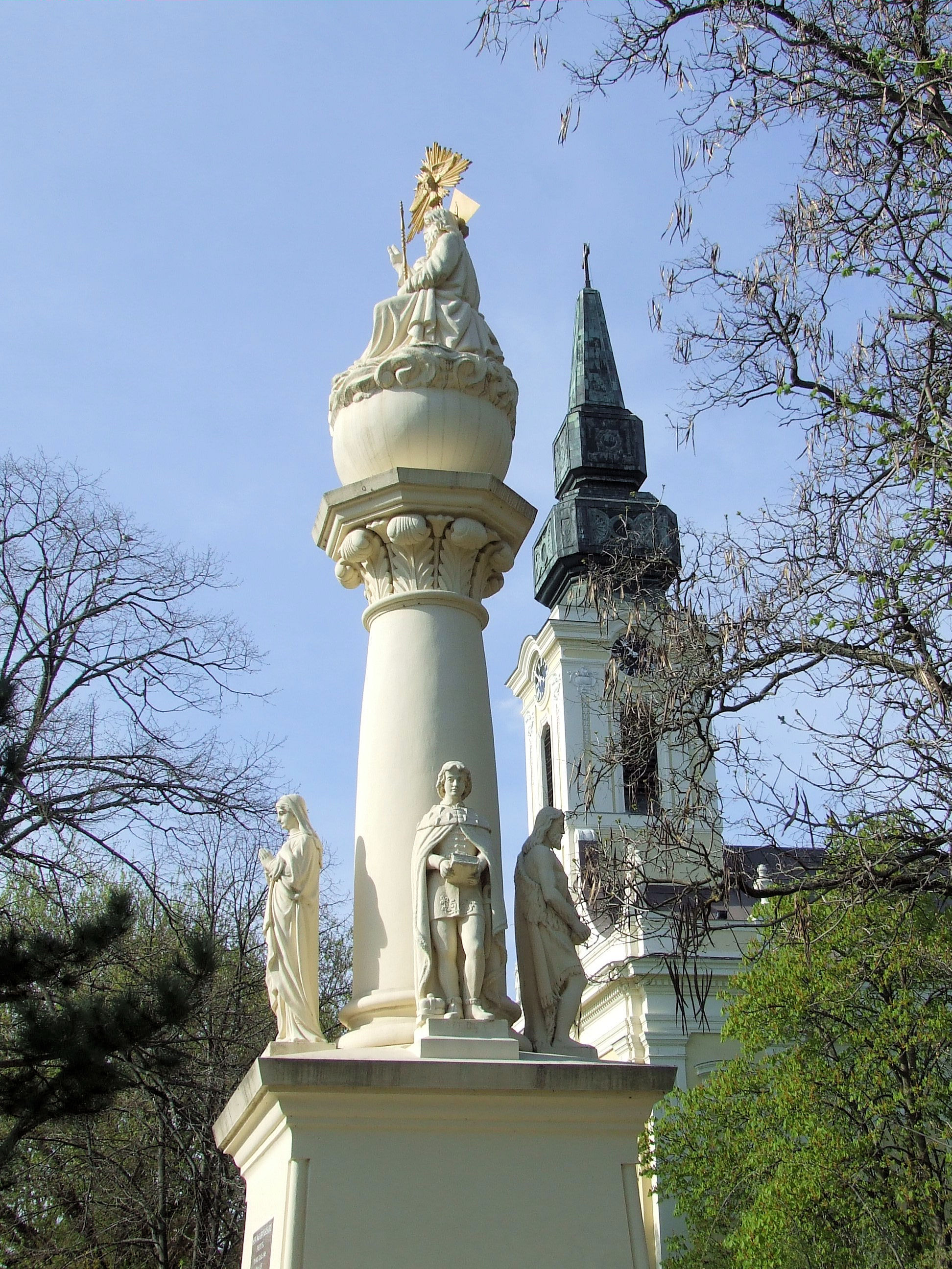 A jánoshalmi Szentháromság-oszlop. A talapzaton szemben Szent Imre szobra. Lábánál korona, kezében Bibliát tart. Jobbján Szűz Mária, balján Keresztelő Szent János